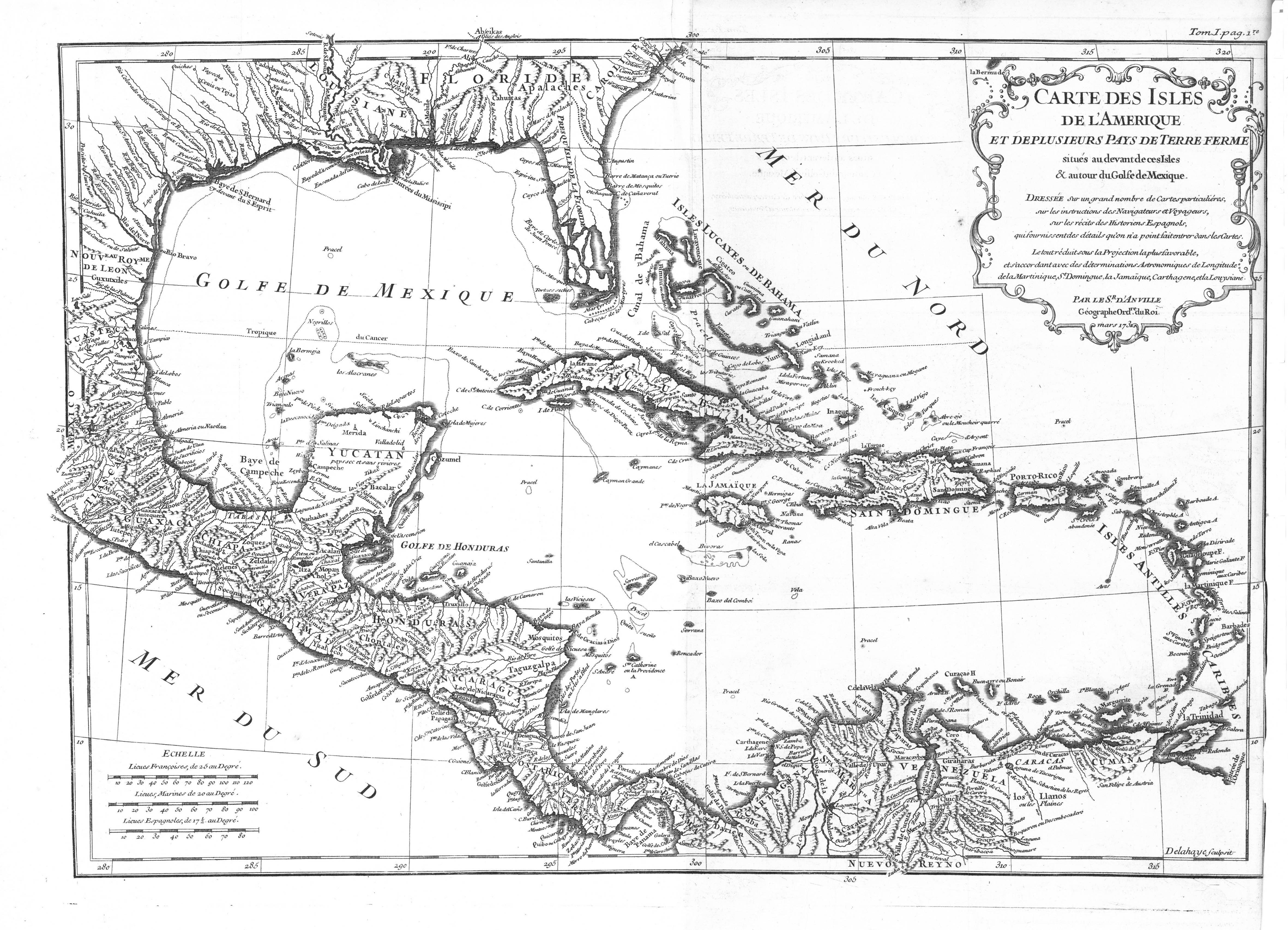 Illustration issue de "Histoire de l'Isle espagnole ou de S. Domingue écrite particulièrement sur des mémoires manuscrits du P. Jean-Baptiste Le Pers jésuite, missionnaire à Saint Domingue, & sur les pièces originales, qui se conservent au dépôt de la Marine", Pierre-François-Xavier de Charlevoix, Paris, Hippolyte-Louis Guérin, 1730, p. 1.